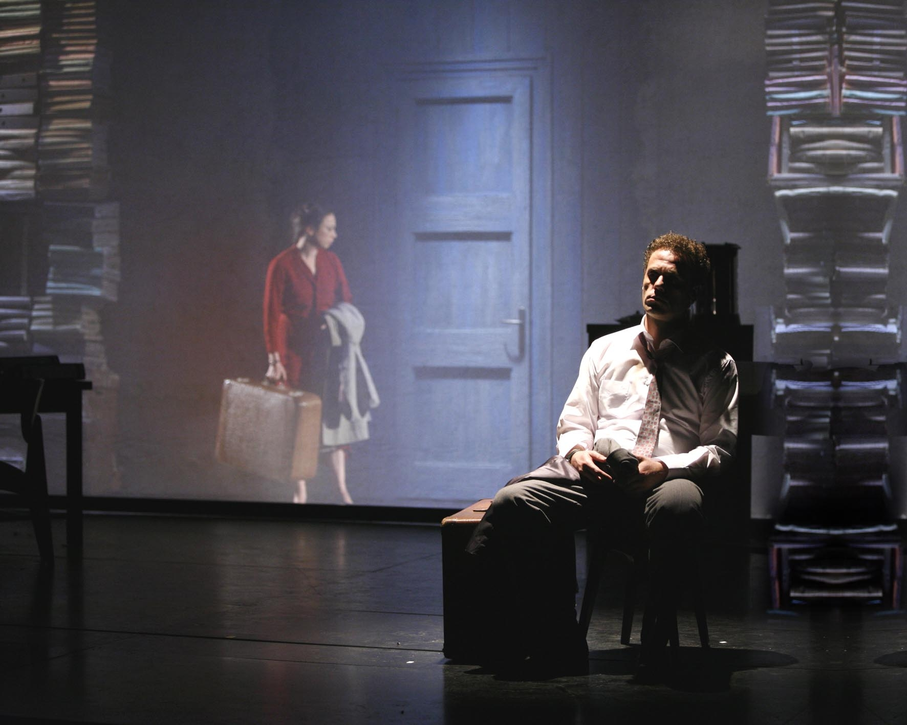 Anda Lessin